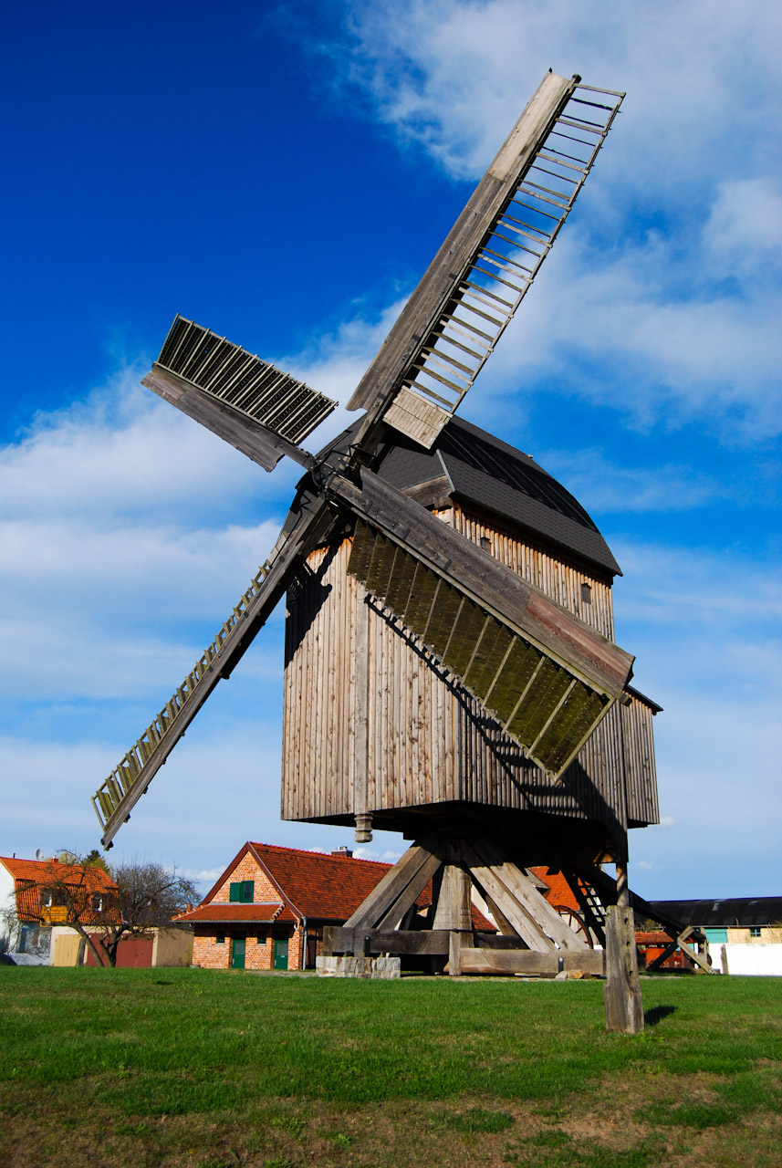 Post mill in Grieben, Saxony-Anhalt, Germany